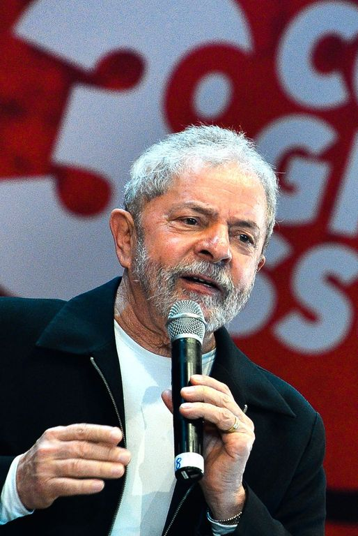 Lula em 20 de novembro de 2015.